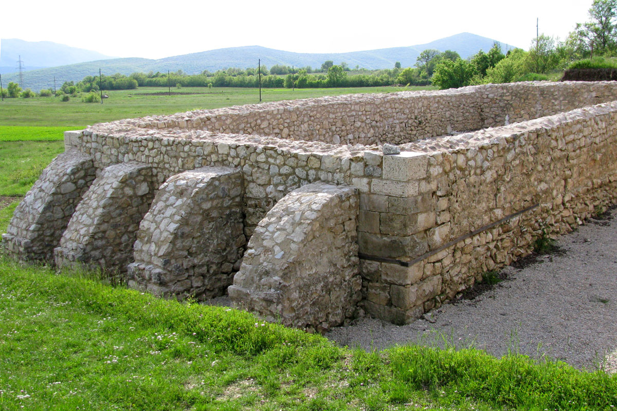 ostaci Tilurija, rimskog logora na brdu Gardun iznad Trilja